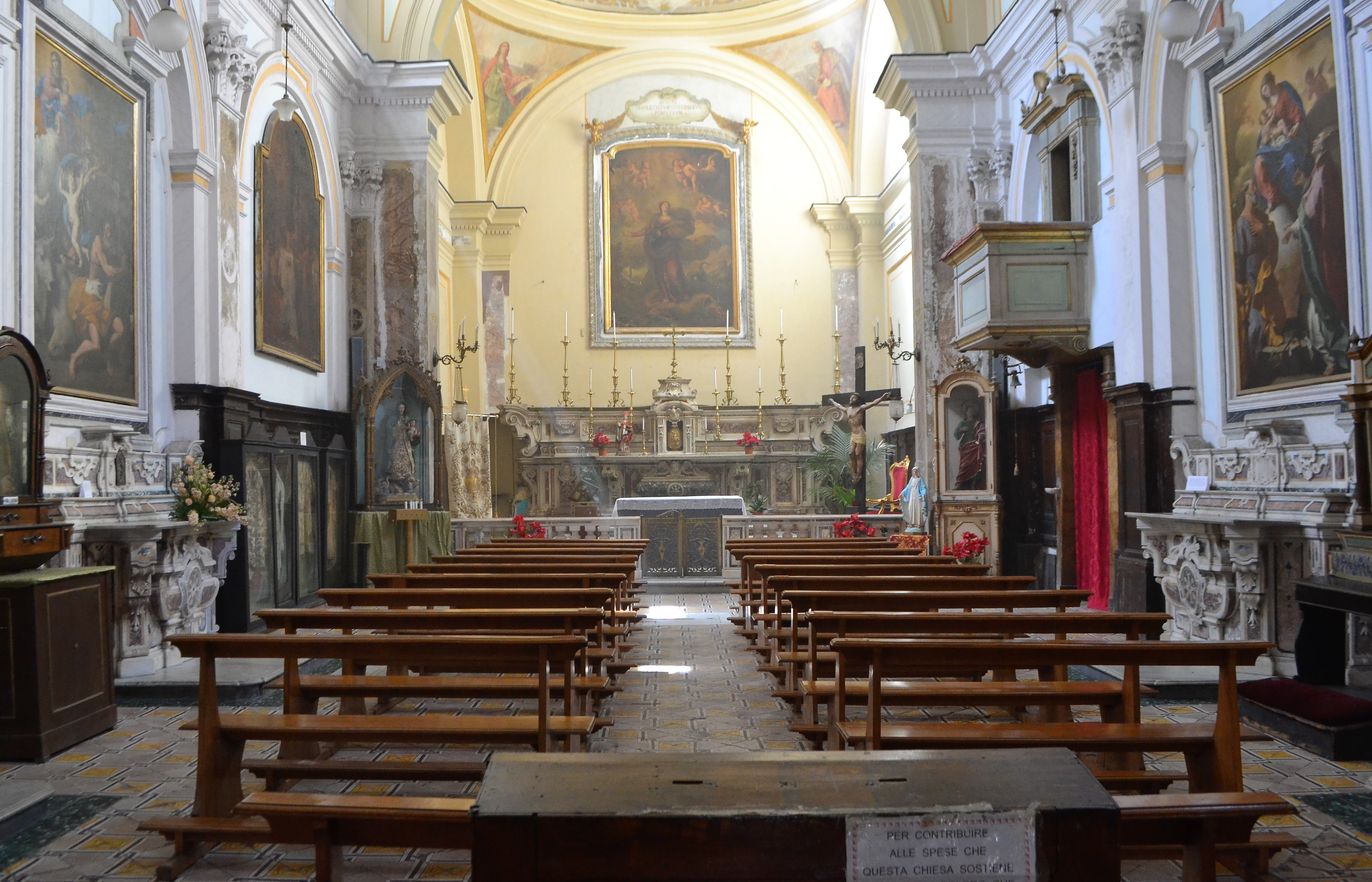 Chiesa di Santa Marta (Napoli) - Interno